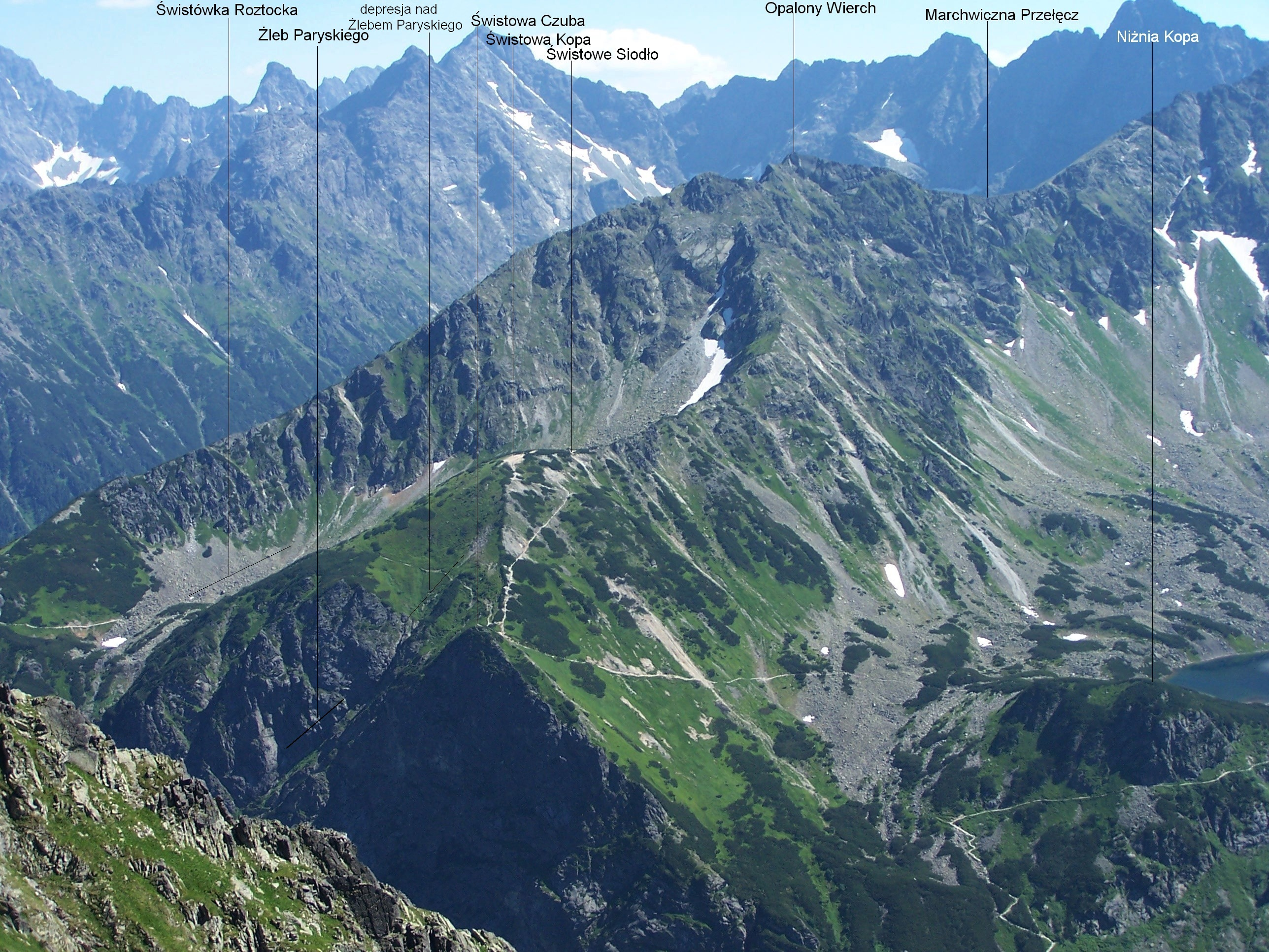 Widok z Krzyznego